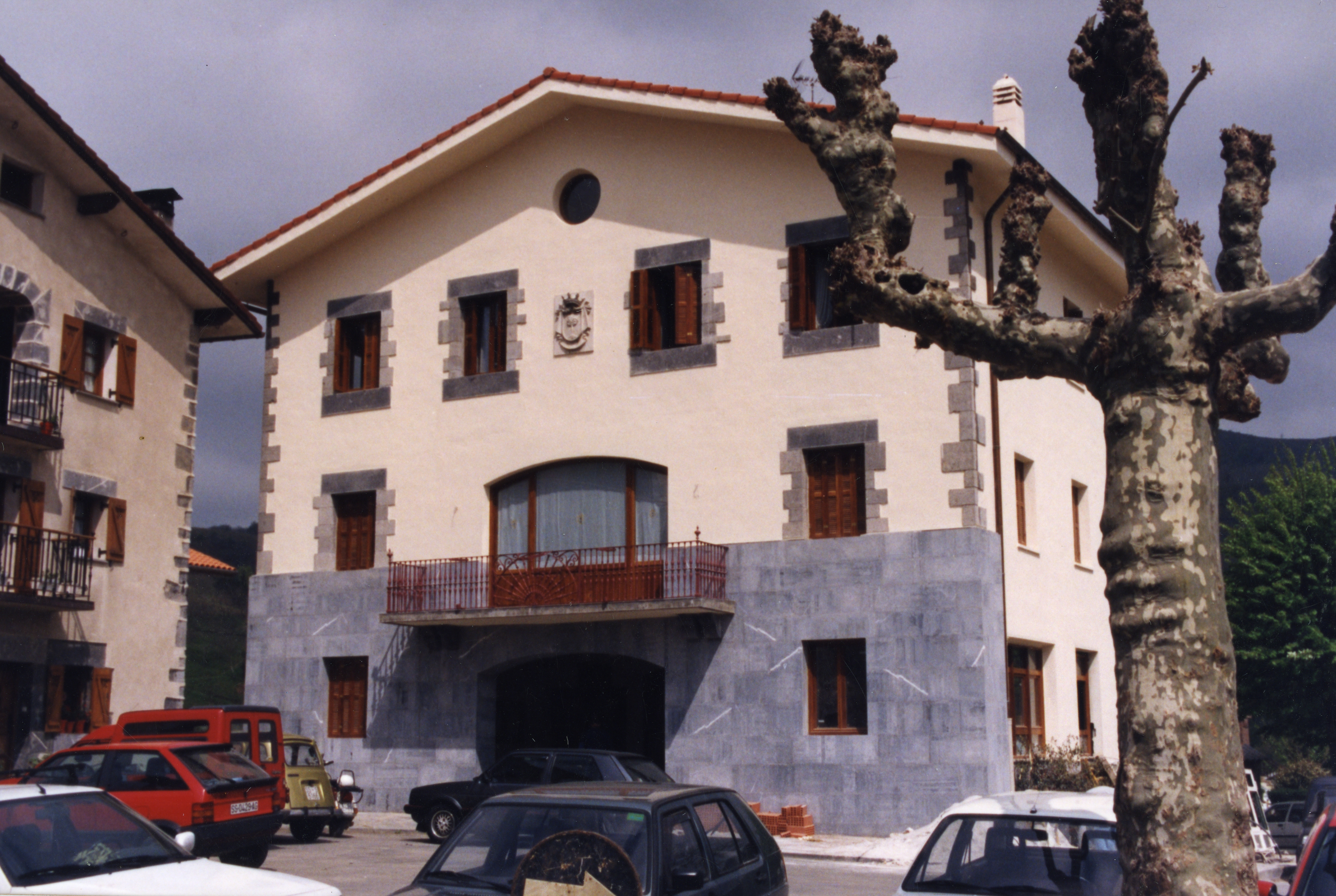 Udaletxea eraberrituta. Aiurri 15 zbk. 3. orr.